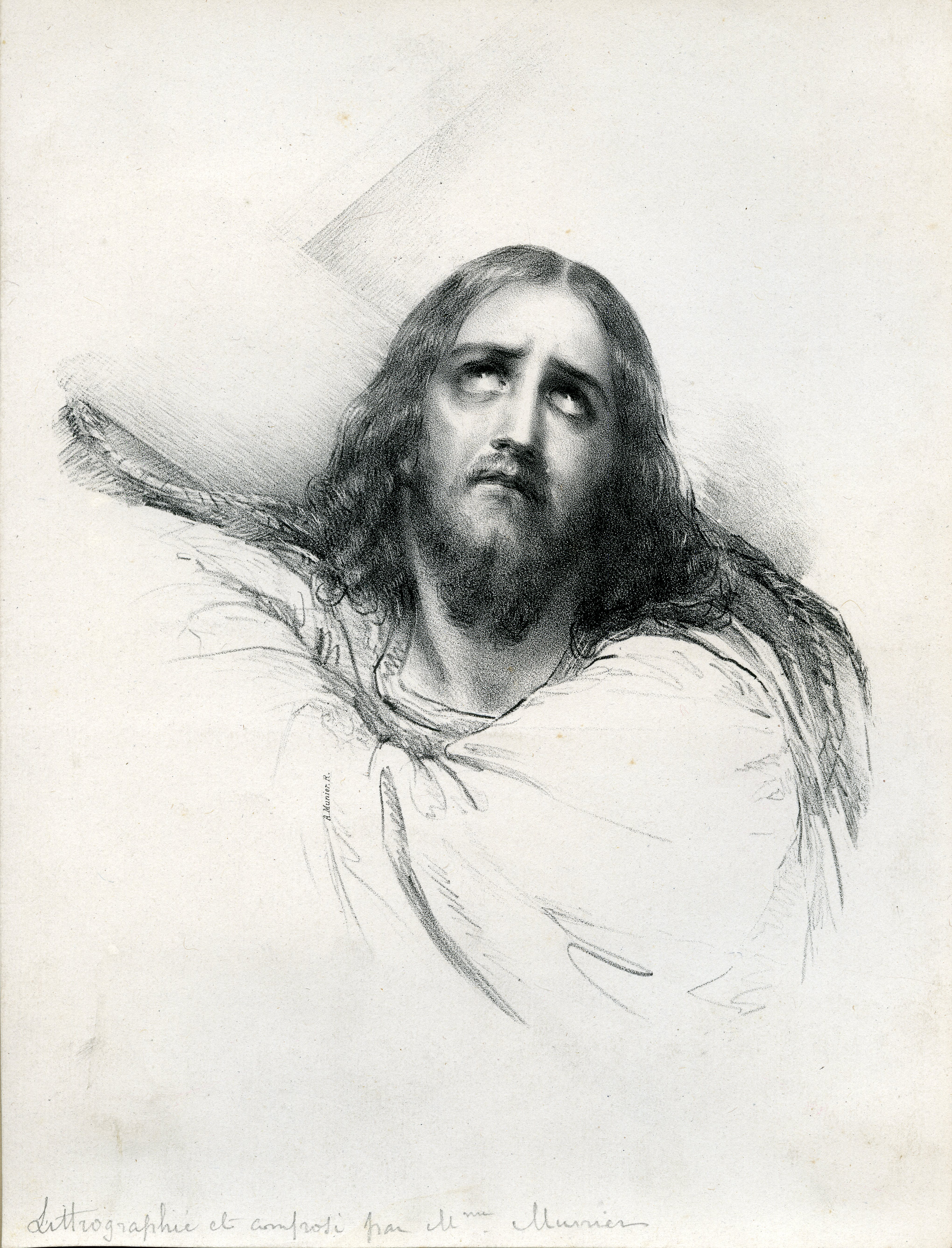 Christ